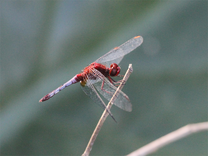 Erythrodiplax fusca, male. Location: Brazil - Mato Grosso